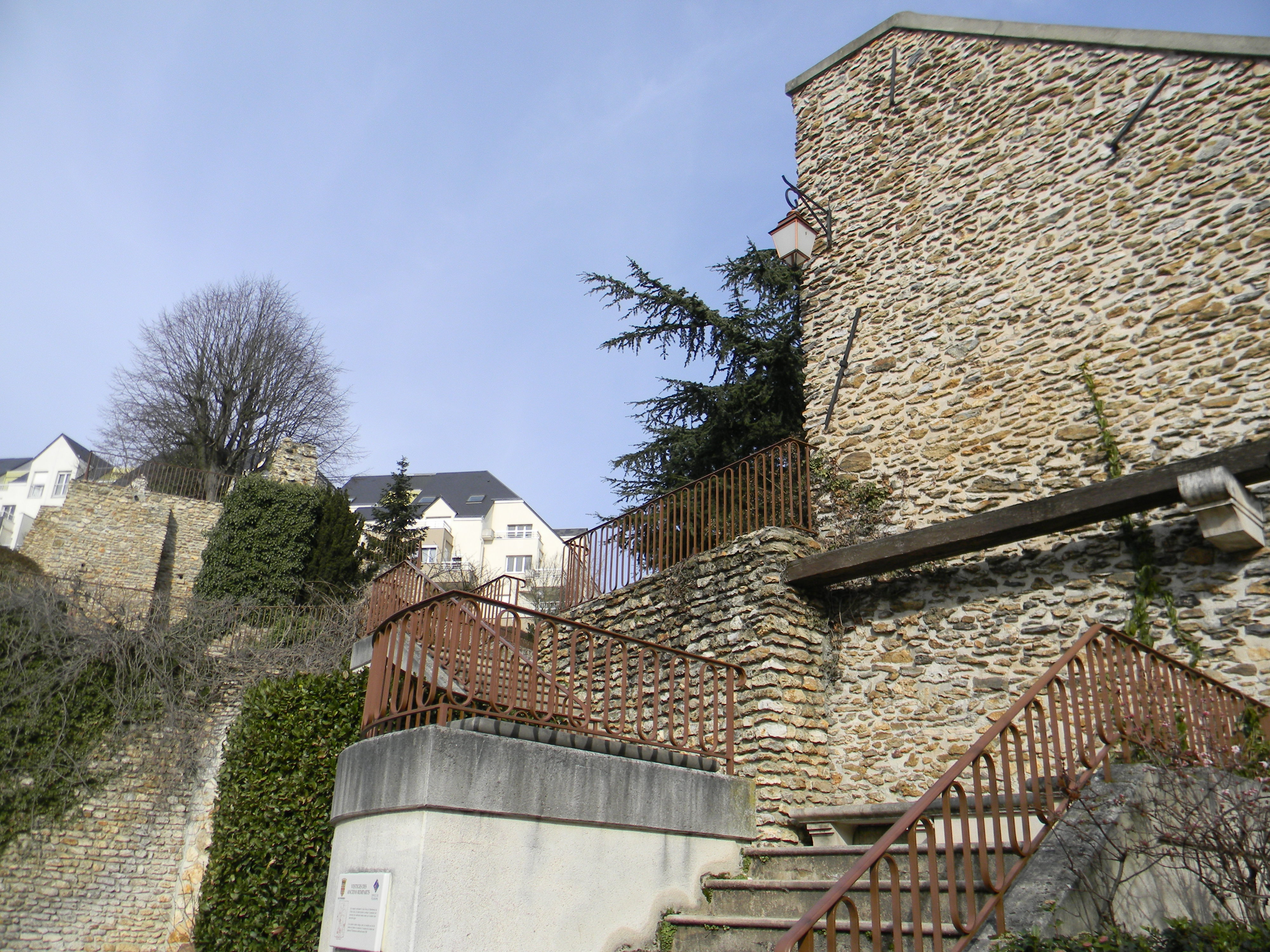 Vestiges des anciens remparts du XVème siècle à Montmorency.